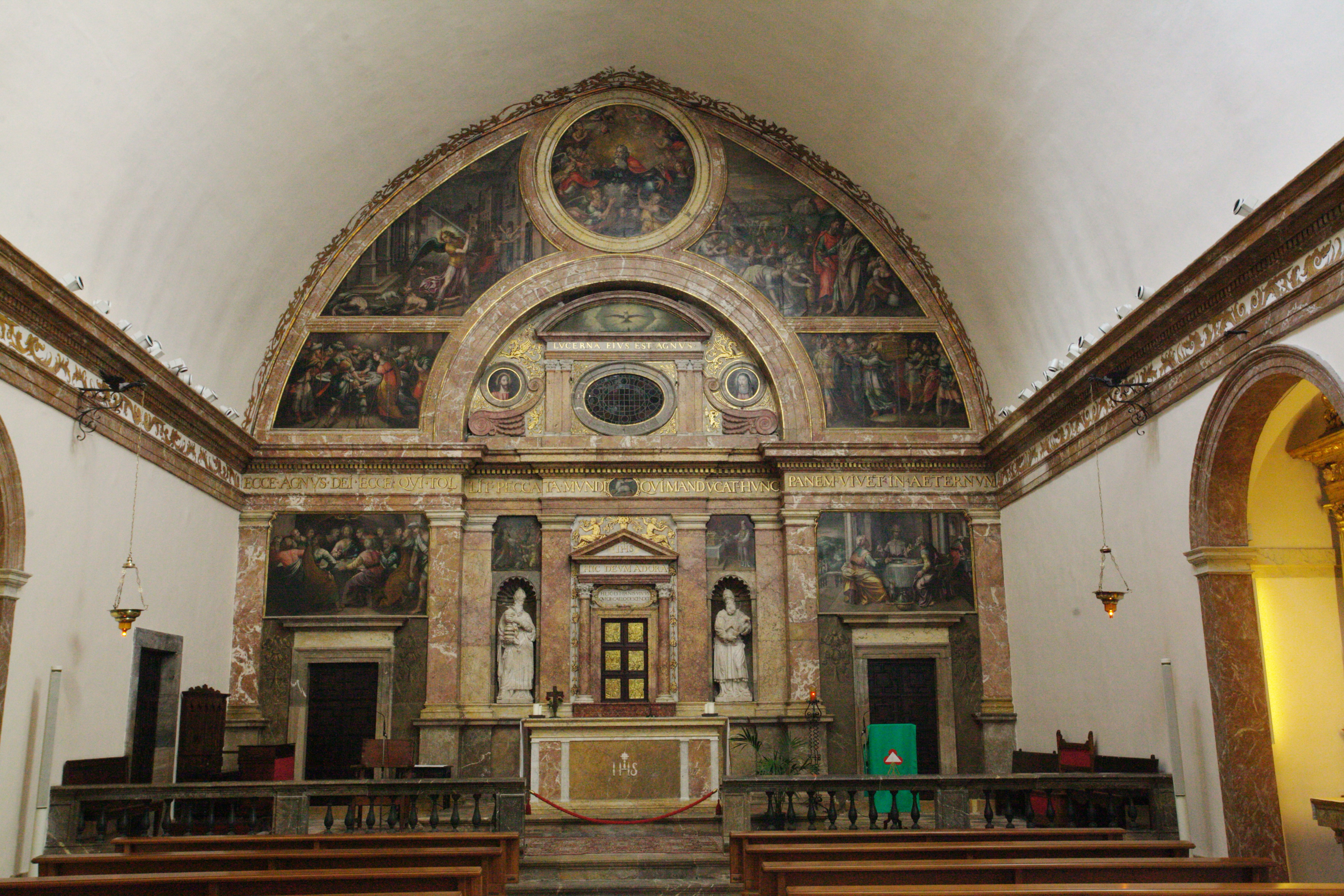 Catedral de Santa Maria (Tarragona) Object location41° 07′ 09″ N, 1° 15′ 29″ E